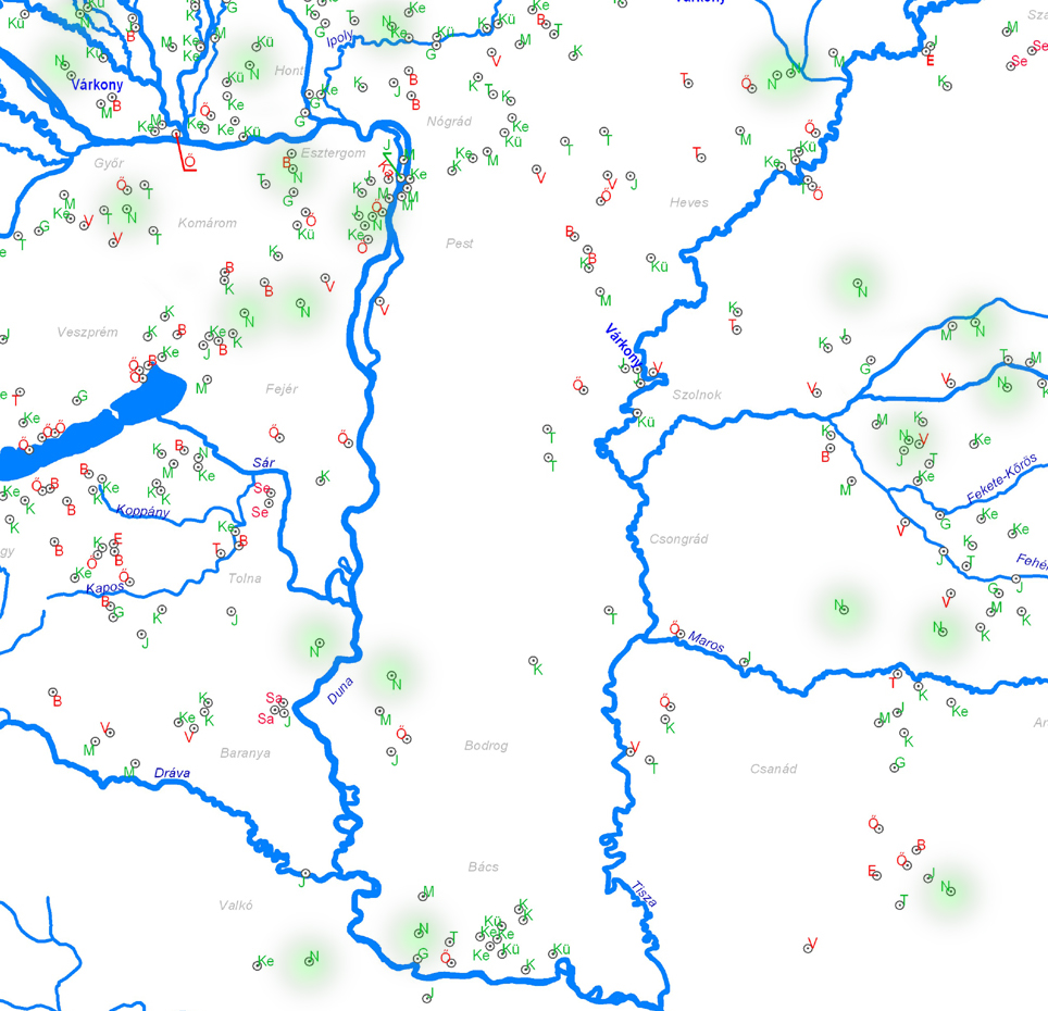 A nyék törzsnév elterjedése a Kárpát-medencében